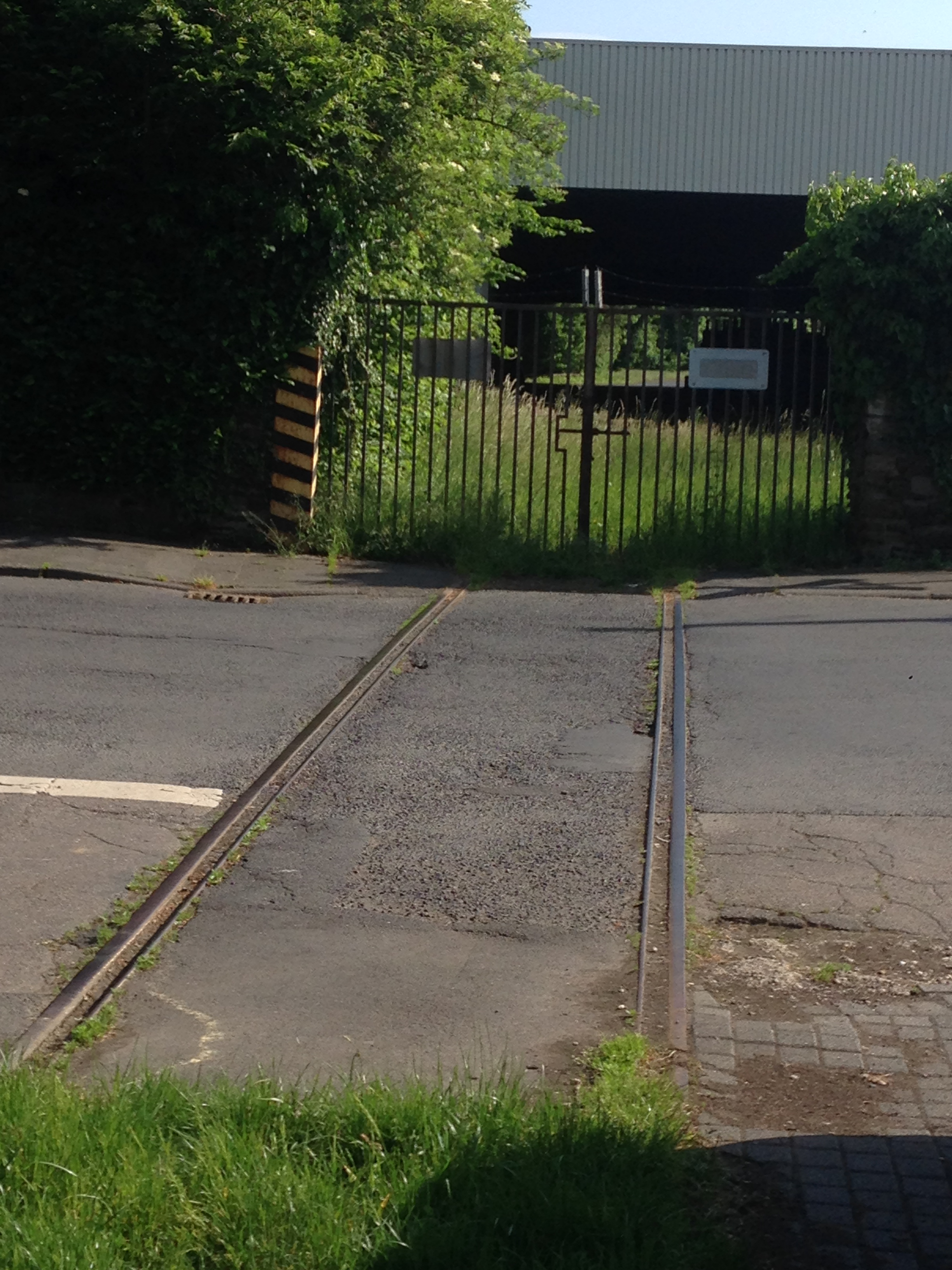 Endpunkt der ehemaligen Bahn Neuwied–Rasselstein–Augustenthal: Einfahrt zur ehemaligen Friedrich Boesner GmbH